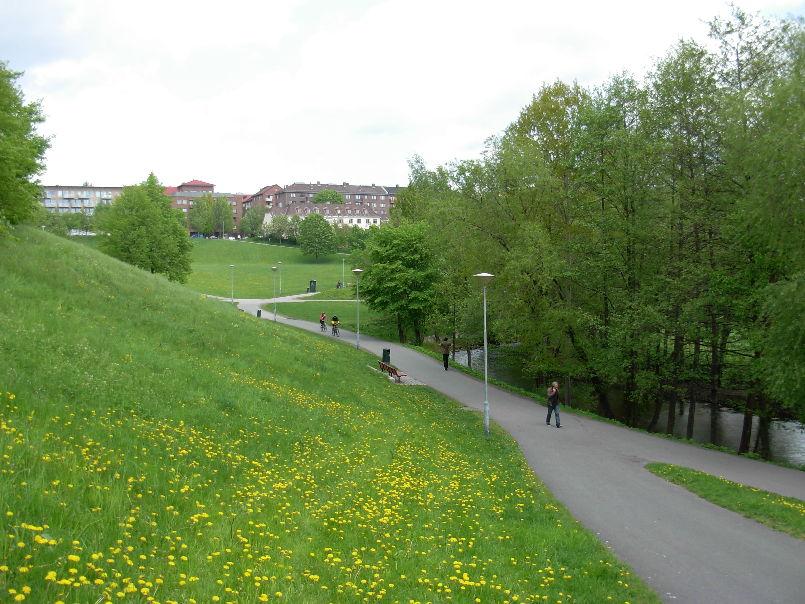 Myraløkka, Sagene, Oslo med Akerselva